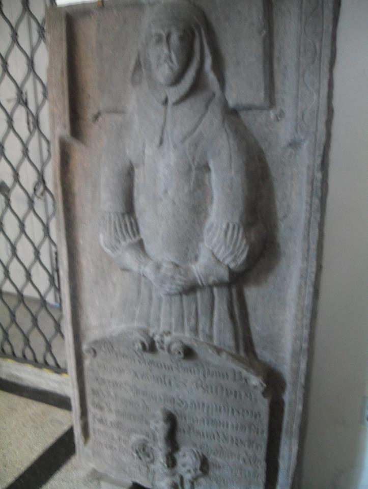 Náhrobek Benigny Haugwitzové von Biskupic, hraběnky von Gashin ve fryštátském kostele sv. Marka